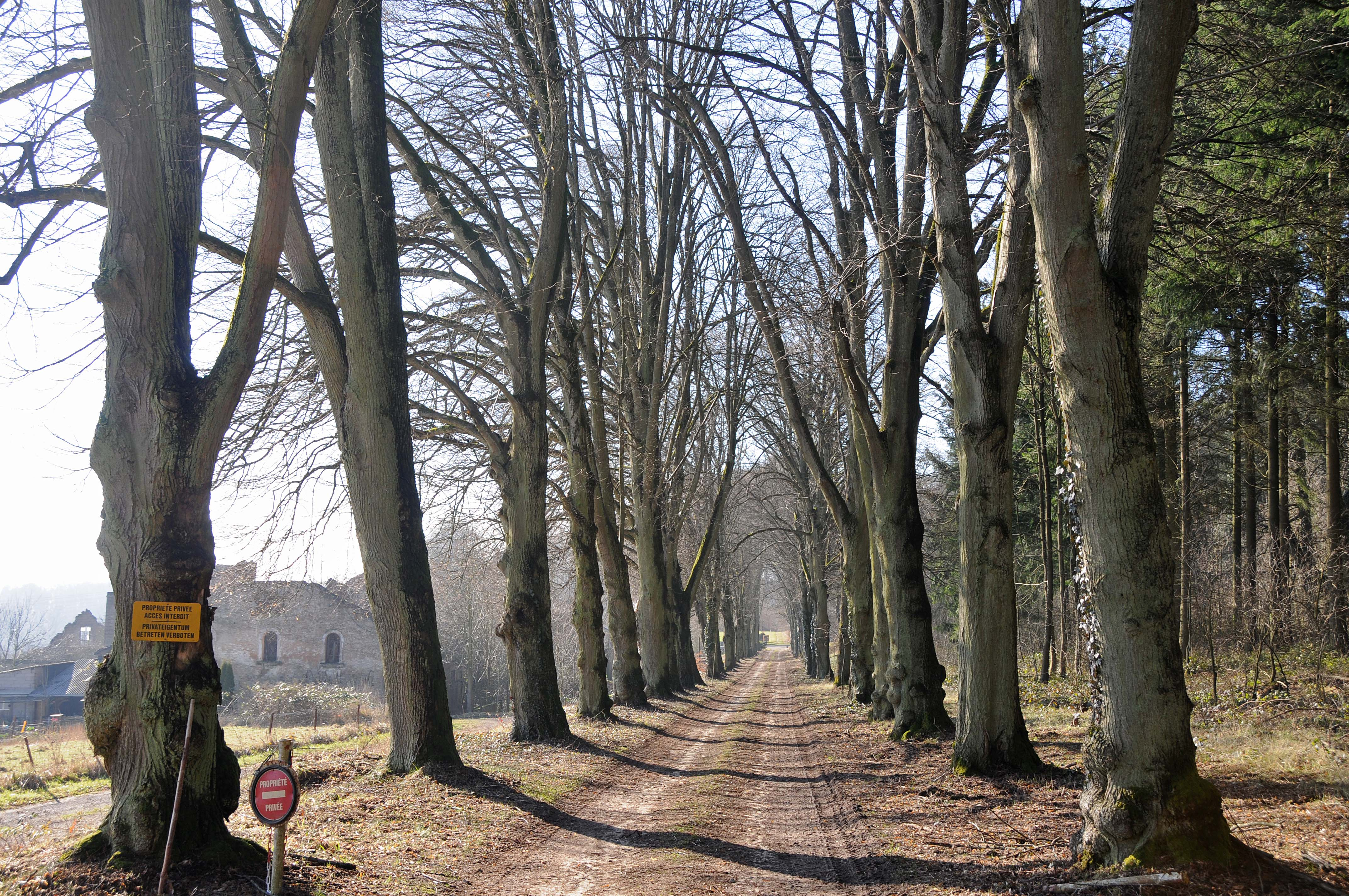 Lannenallee um Scheedhaff.